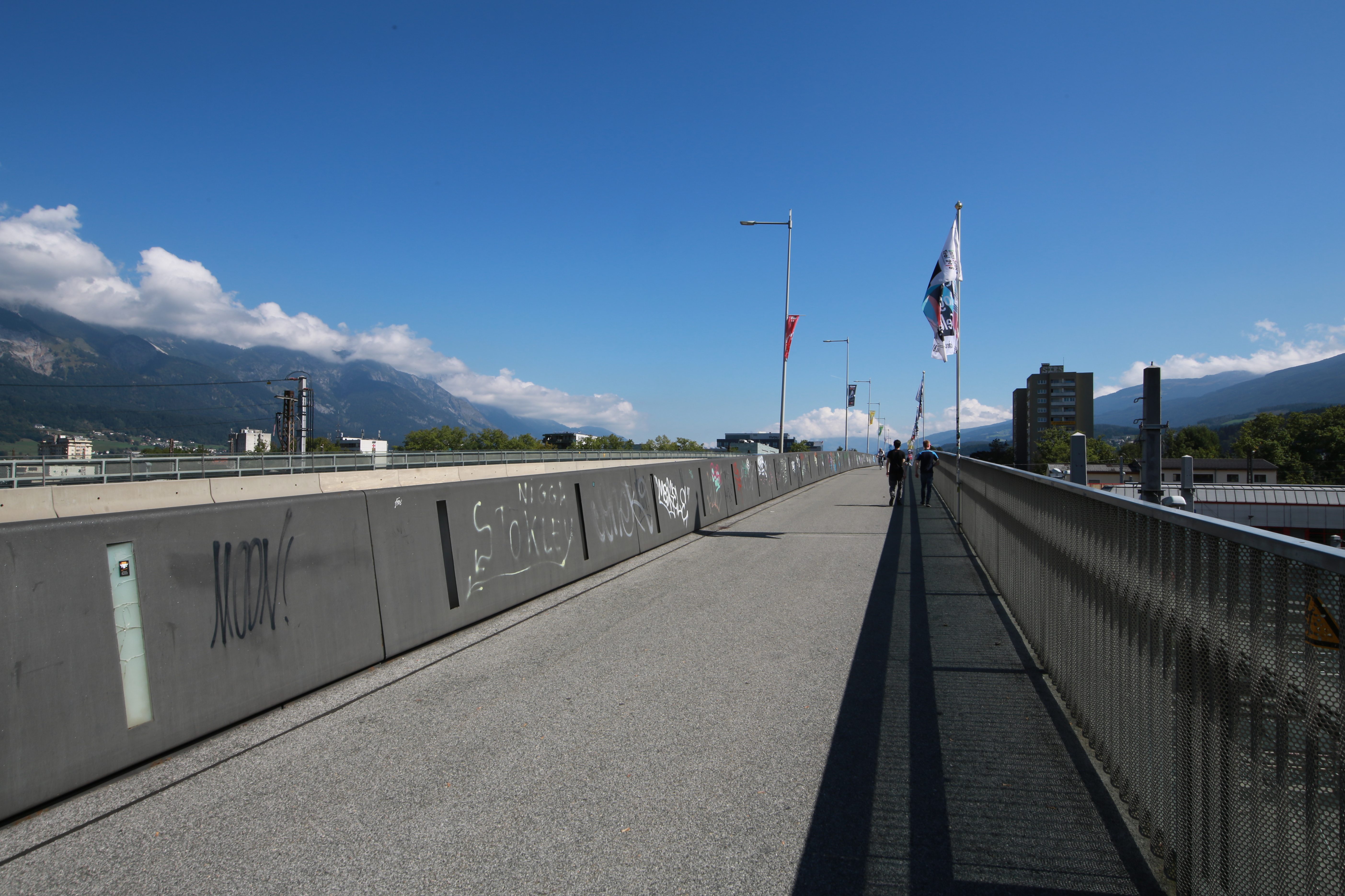 Olympiabrücke